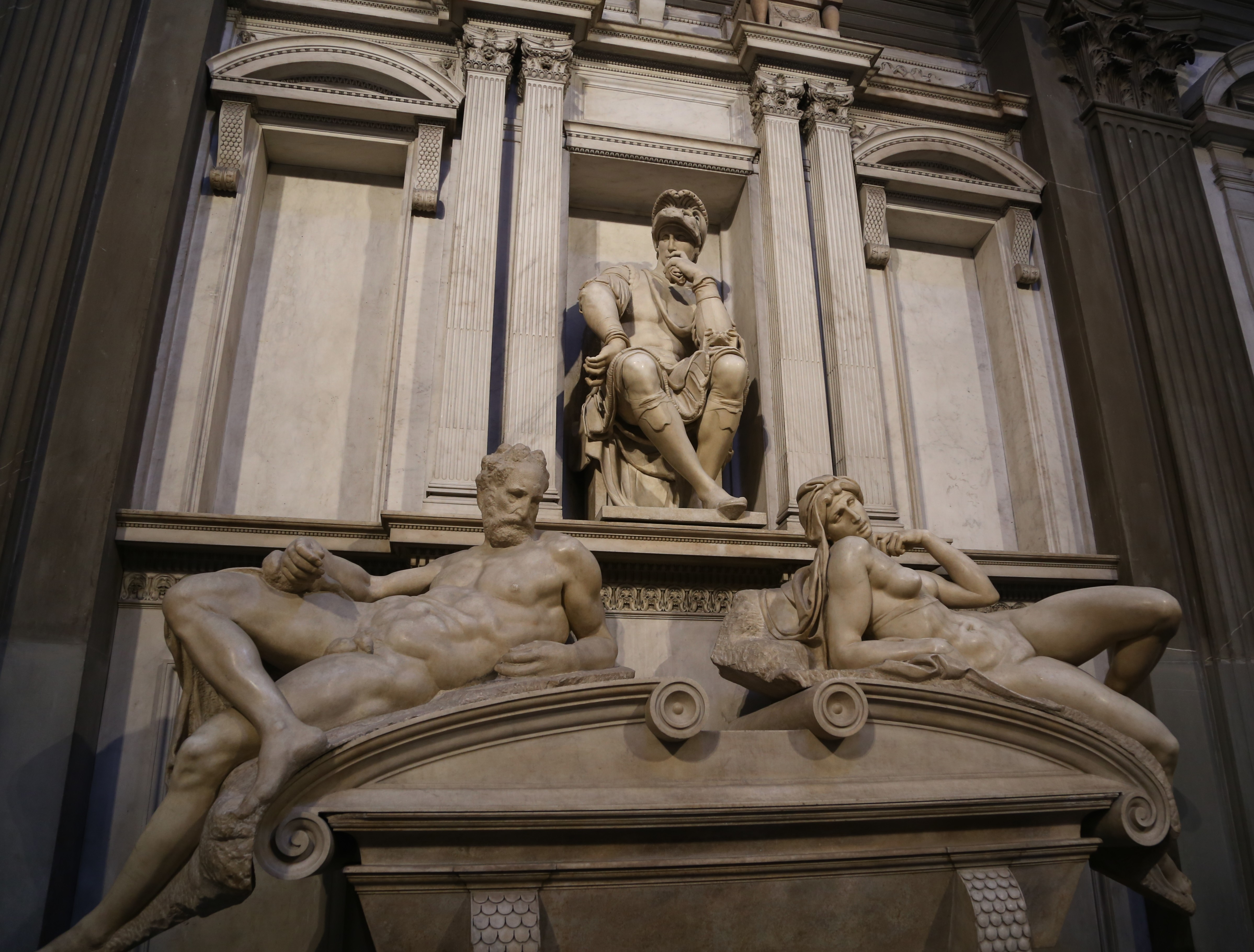 Medici-Kapelle, Florenz Grabmal von Lorenzo II. de Medici (Michelangelo)